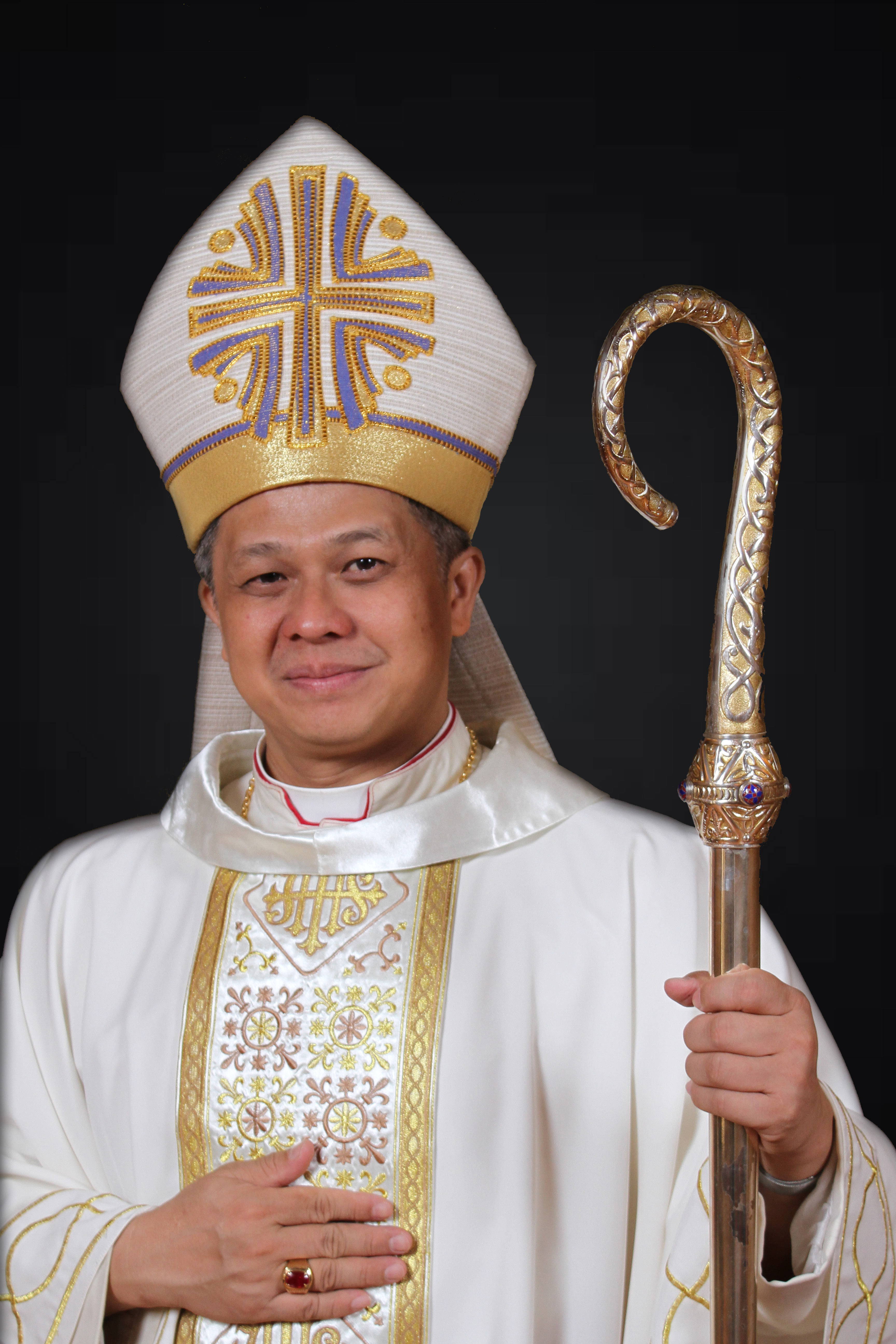 Foto Komsos Keuskupan Bandung dan Komsos Katedral Bandung